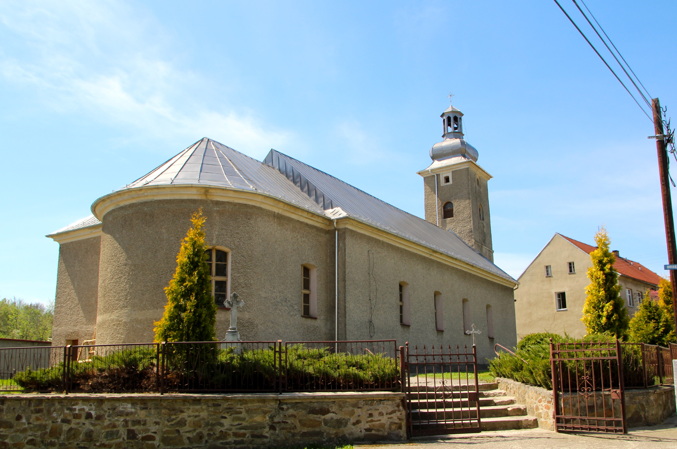 Lewice – kościół filialny p.w. św. Marii Magdaleny, 1834 (zabytek nr 1175/66 z 19.02.1966).